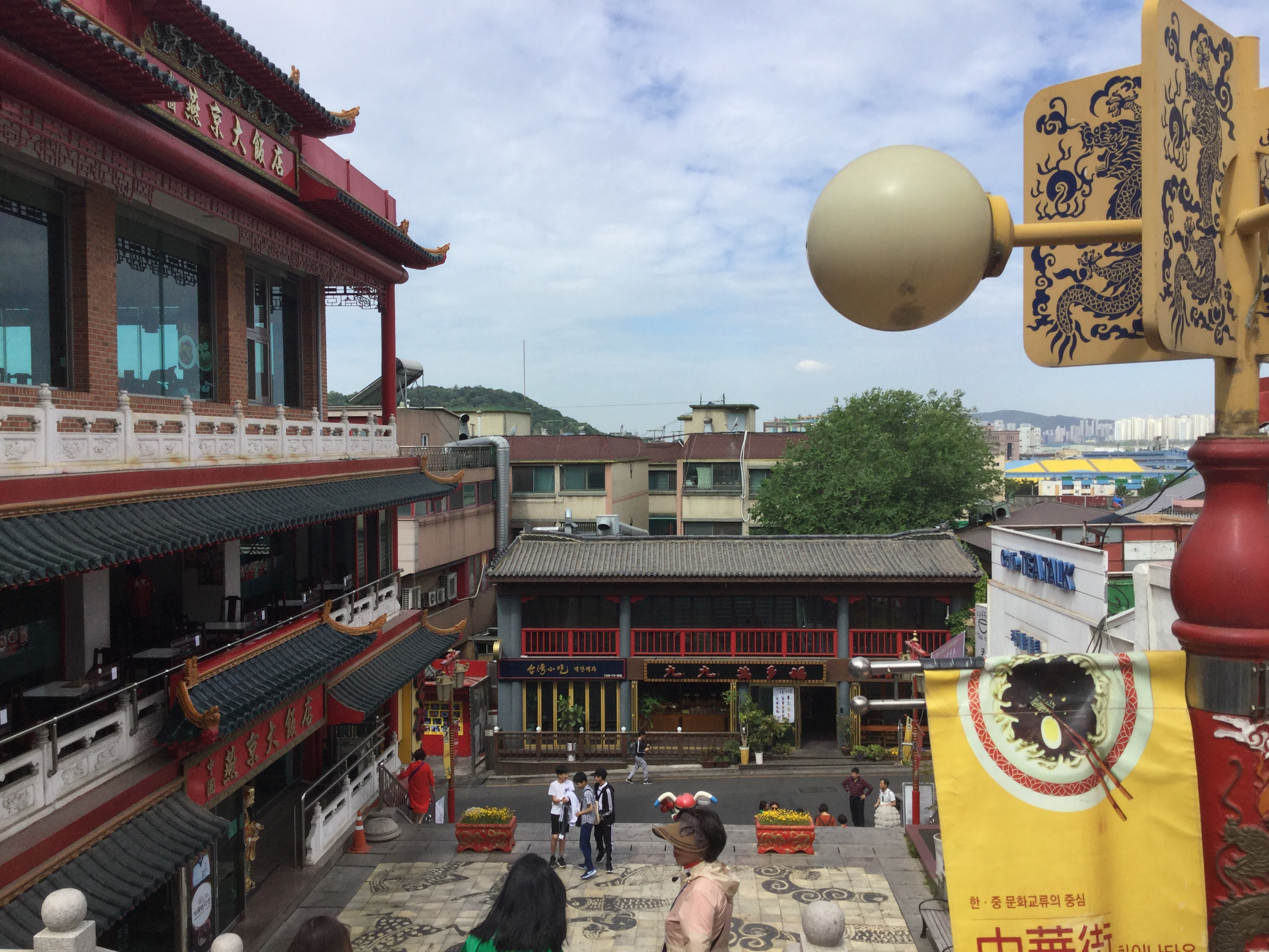 인천 차이나 타운